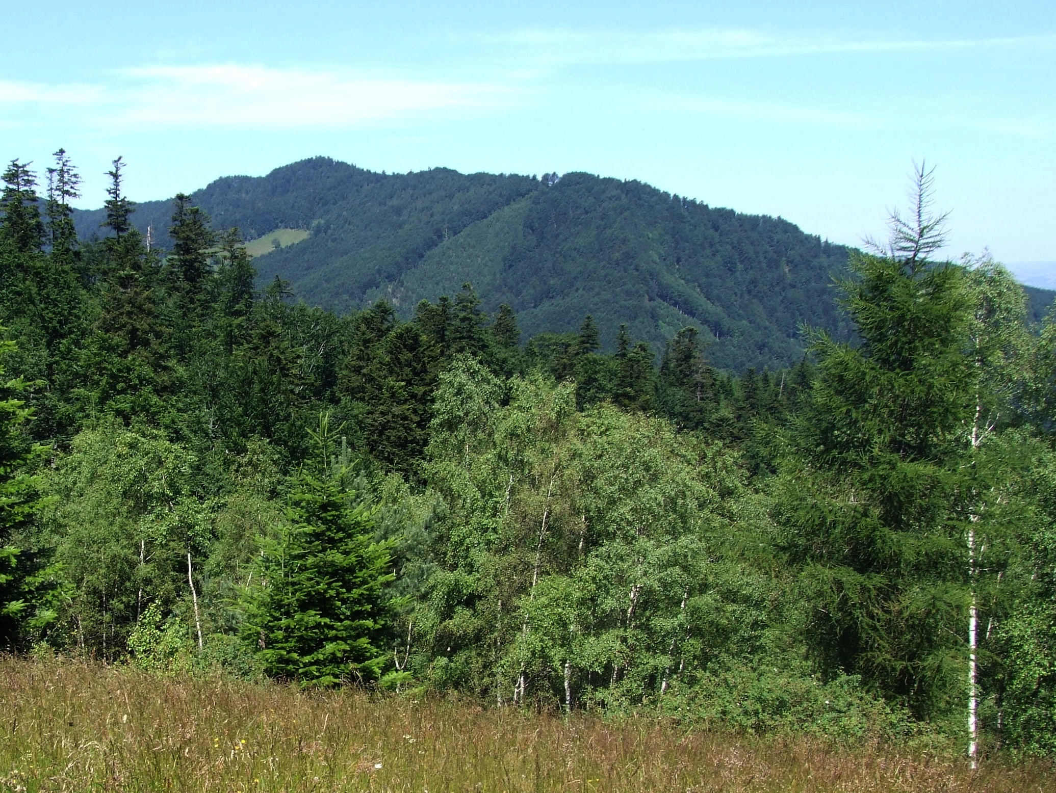 Widok z polany Poczekaj na Jaworzynę z polaną Maćkowską i położoną w dole pod nimi Małą Roztokę